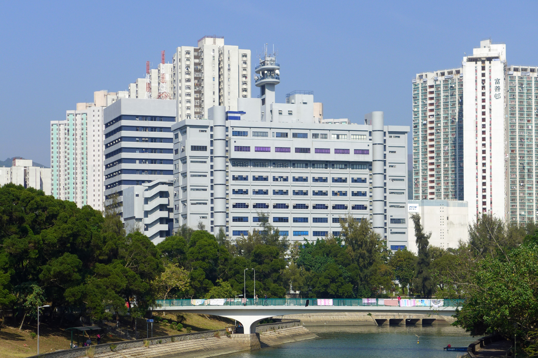 NTN Regional Headquarters